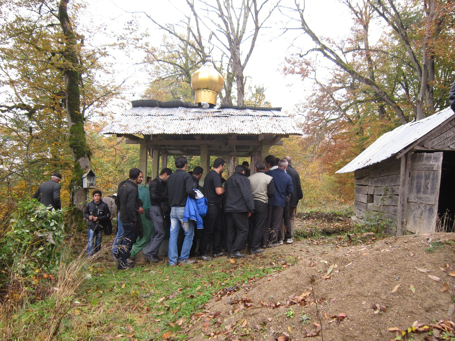 امامزاده روستای لالا در محرم 92